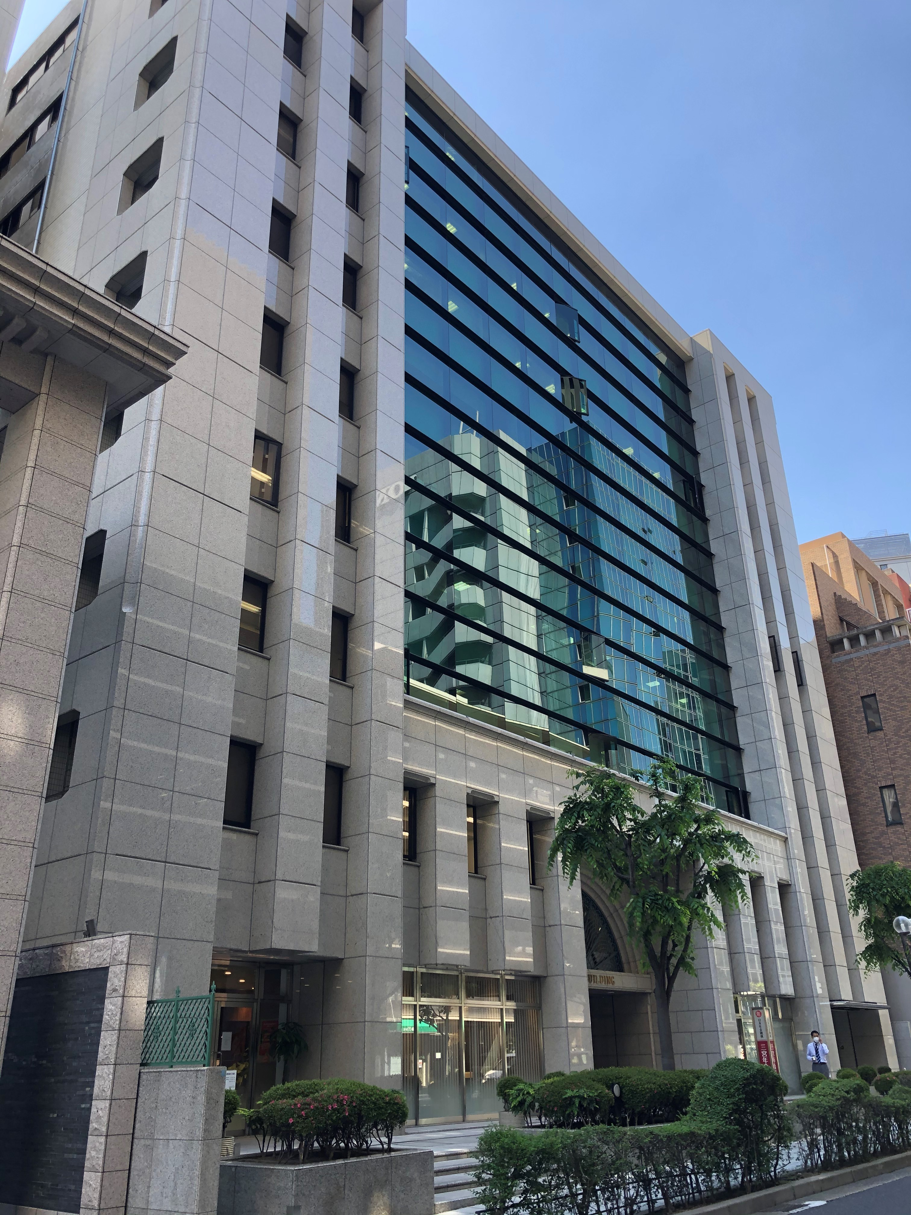 神戸市の栄光ビル